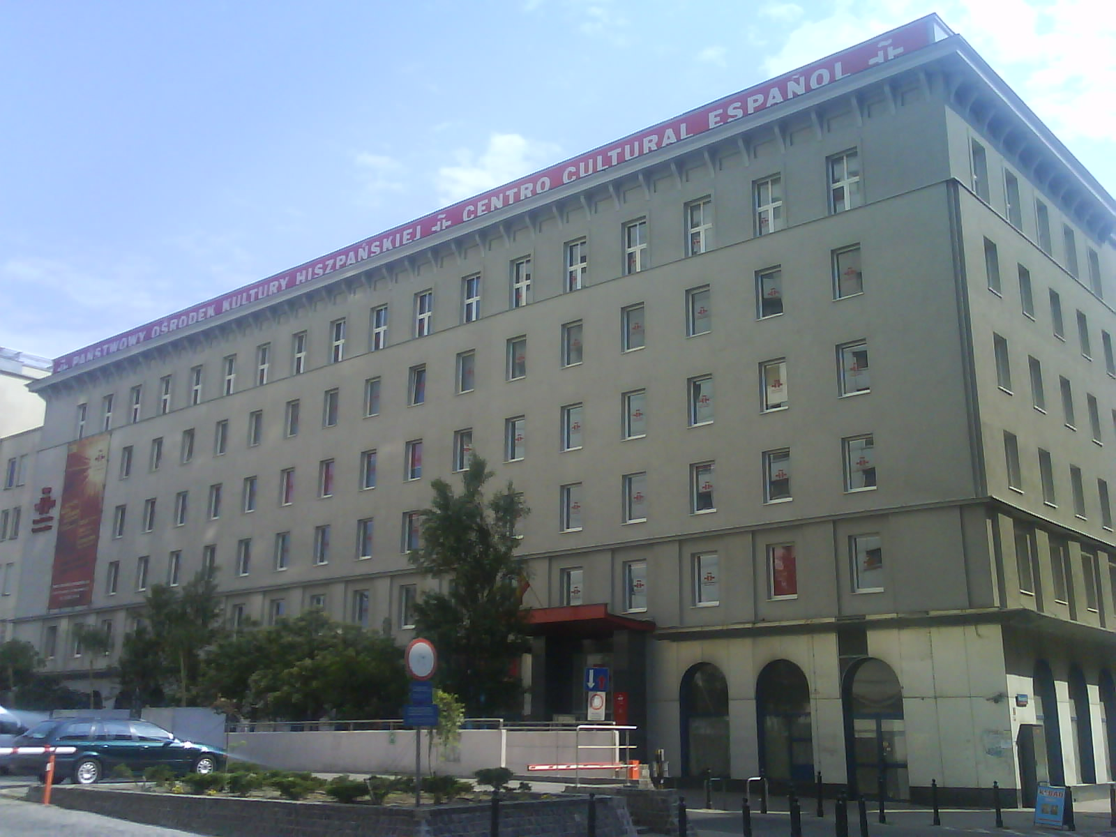 Instytut Cervantesa w Warszawie.